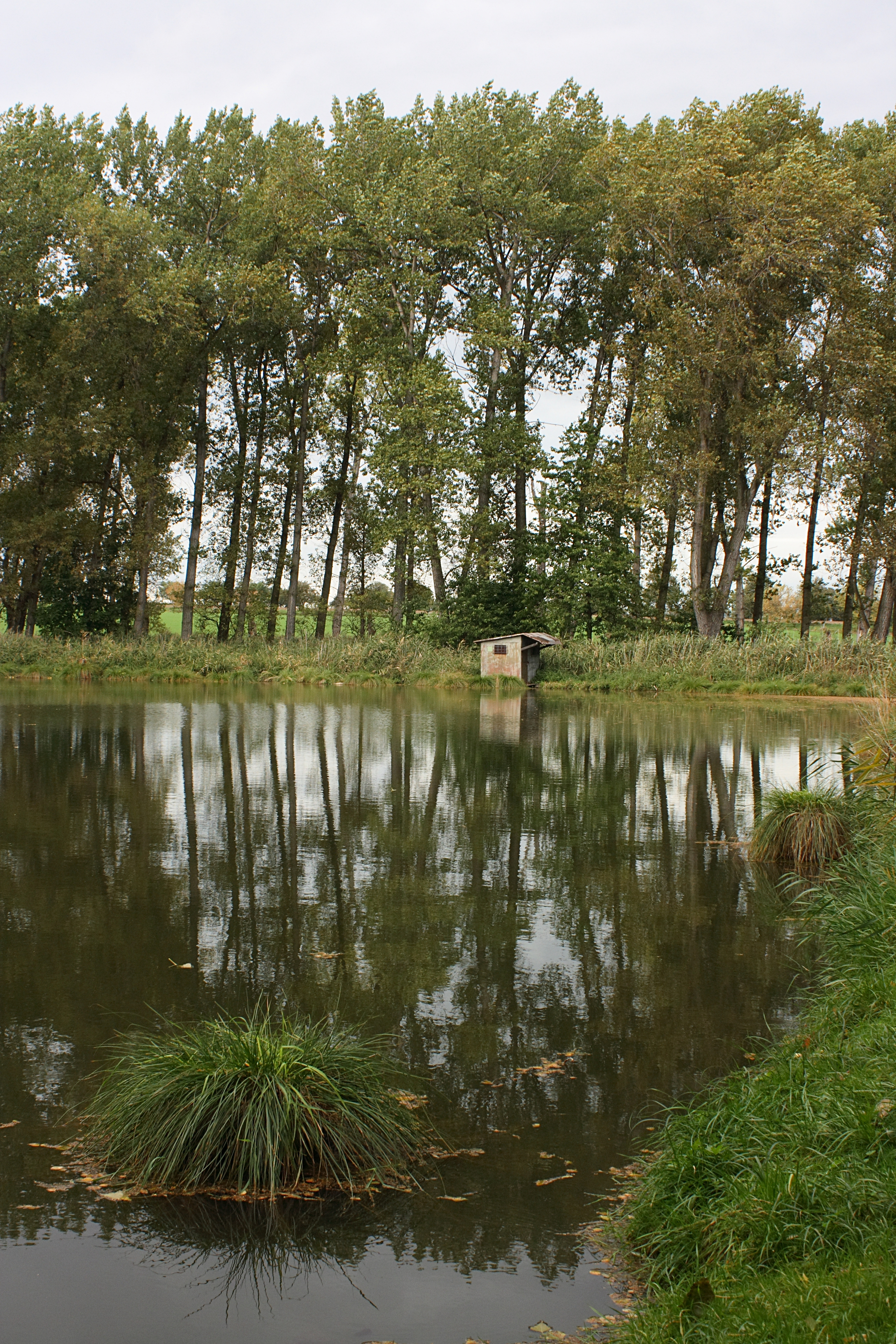 Trsy ostřice latnaté v rybníčku v Břevské rákosině